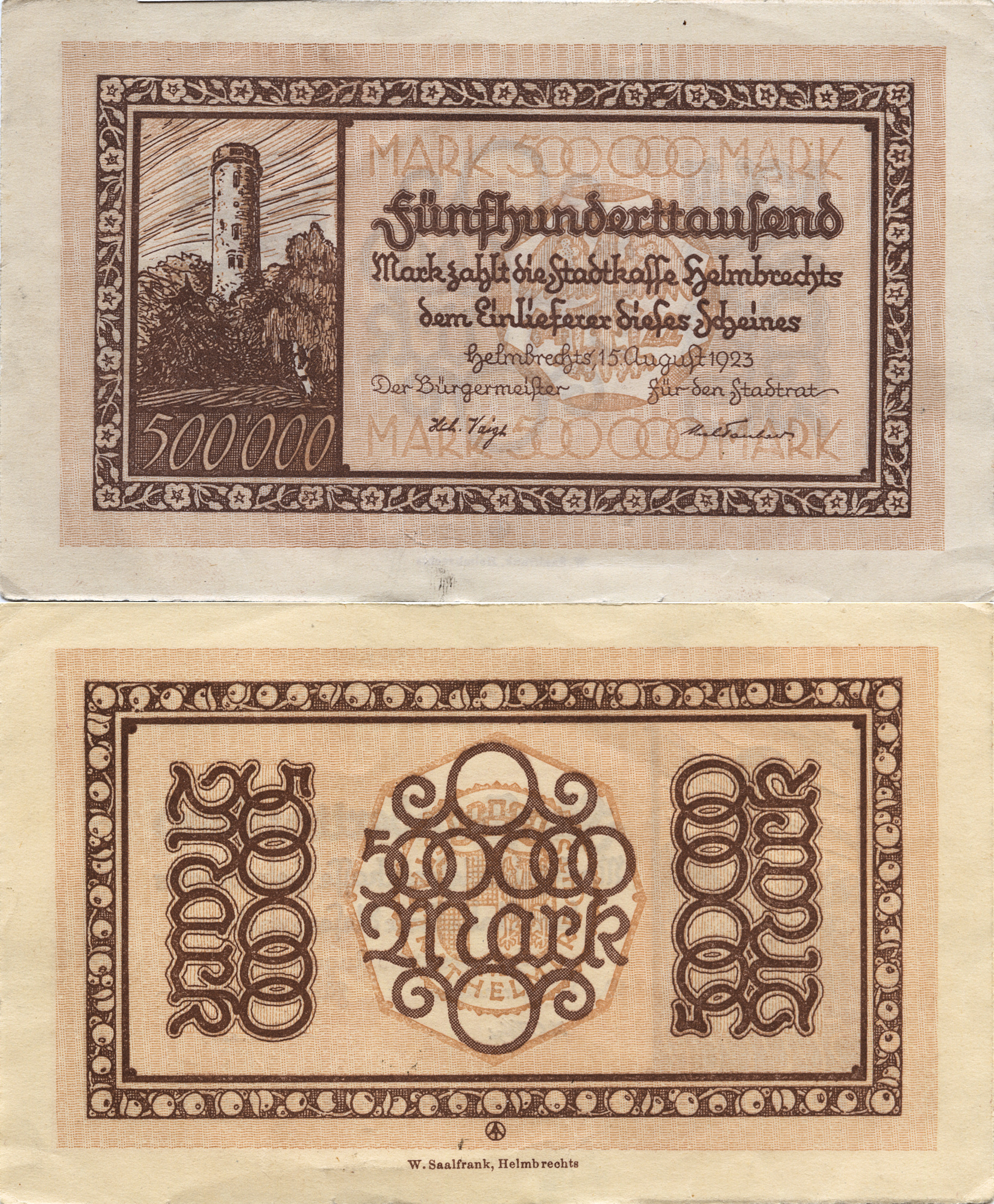 500.000 Mark, Helmbrechts, 1923